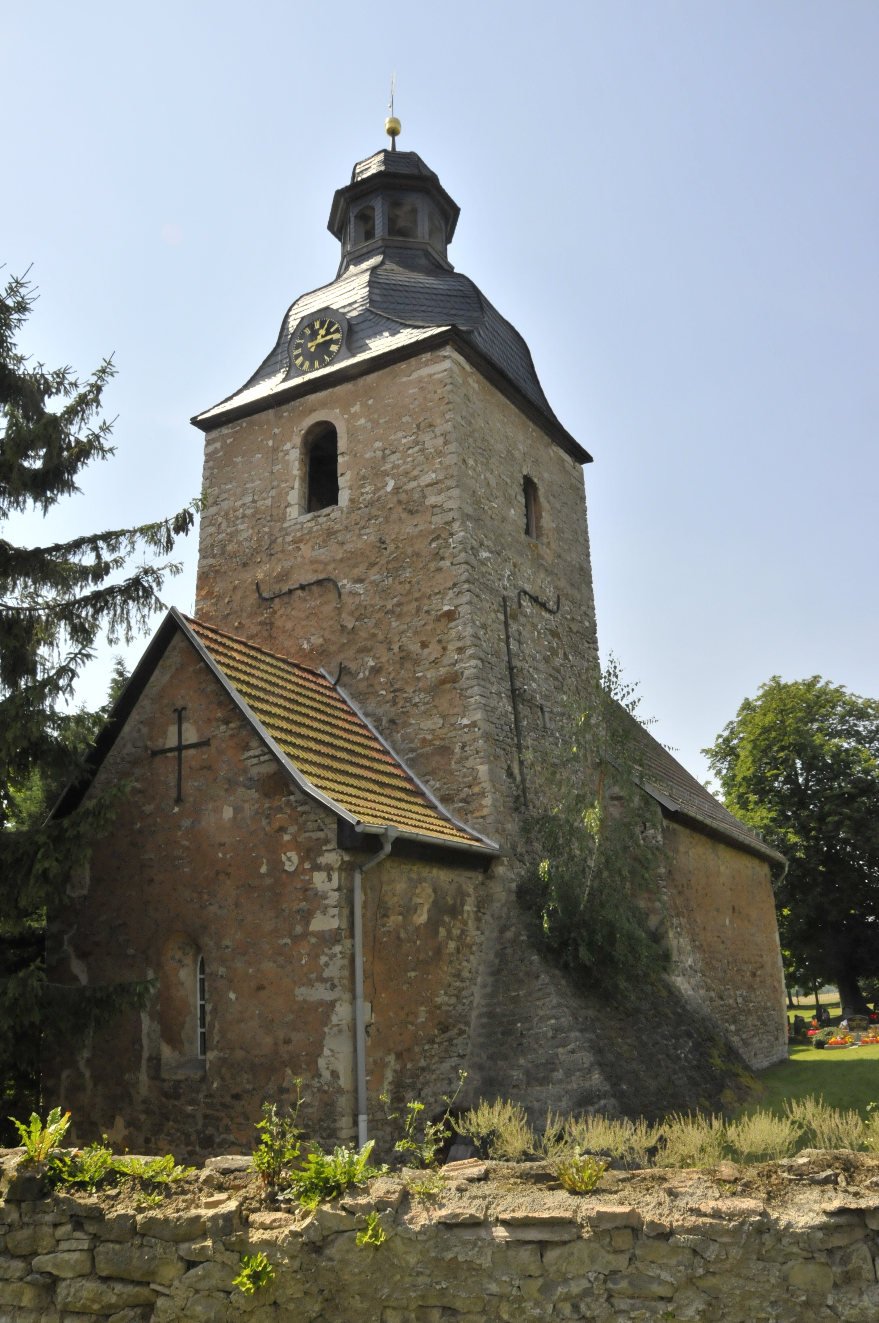 Otterstedt, Kirche